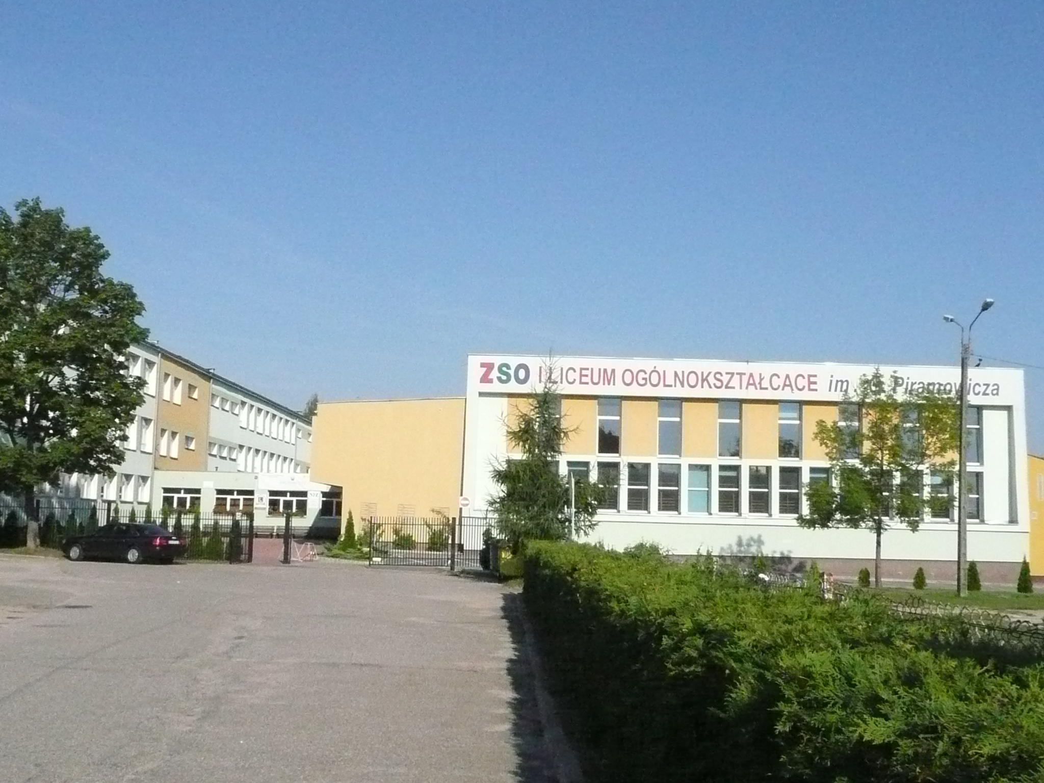 ZSO w Augustowie